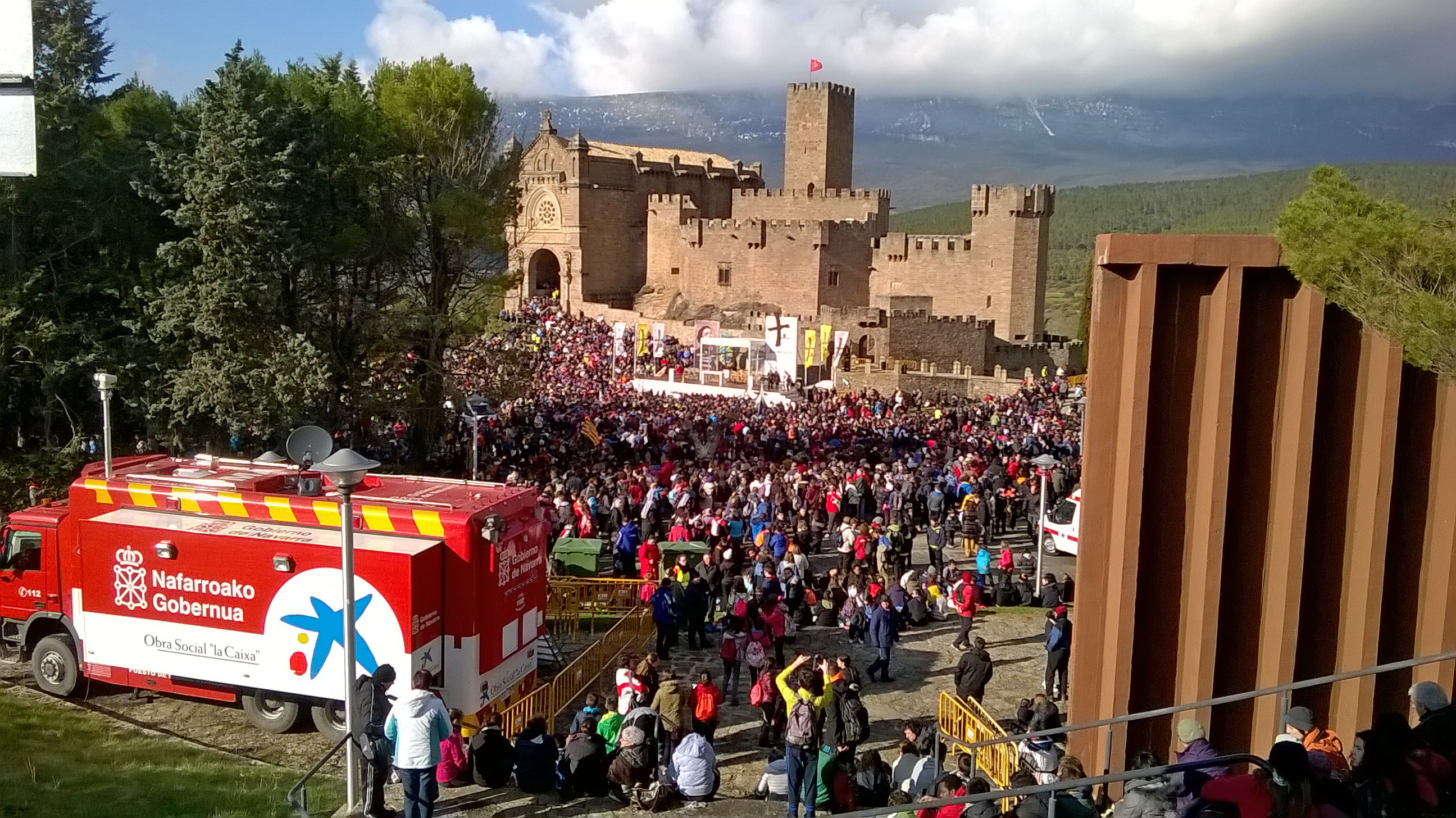 2015eko Xabierraldia, Nafarroa, Euskal Herria.